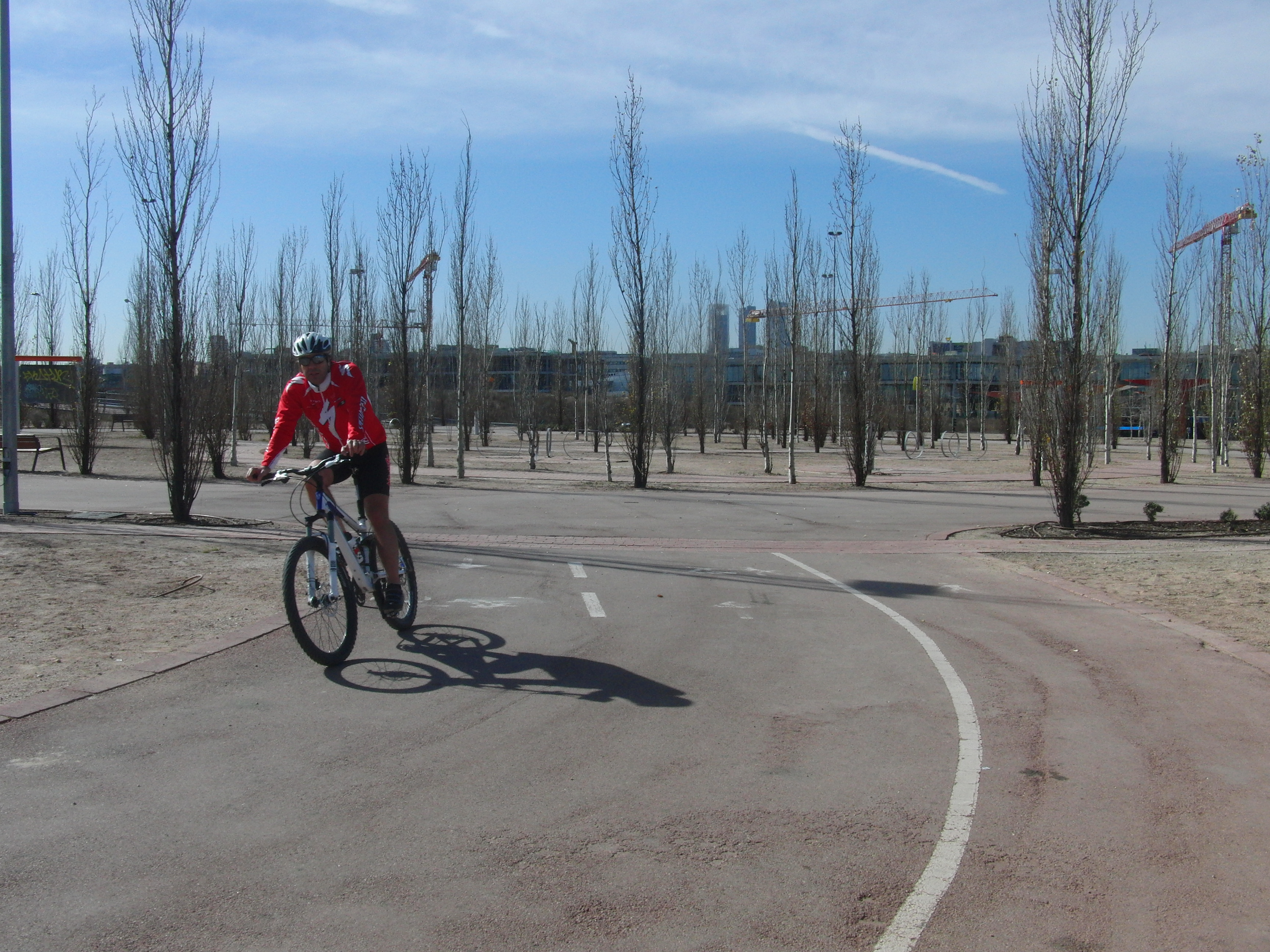 17 Anillo Verde PK 0 - 12.08